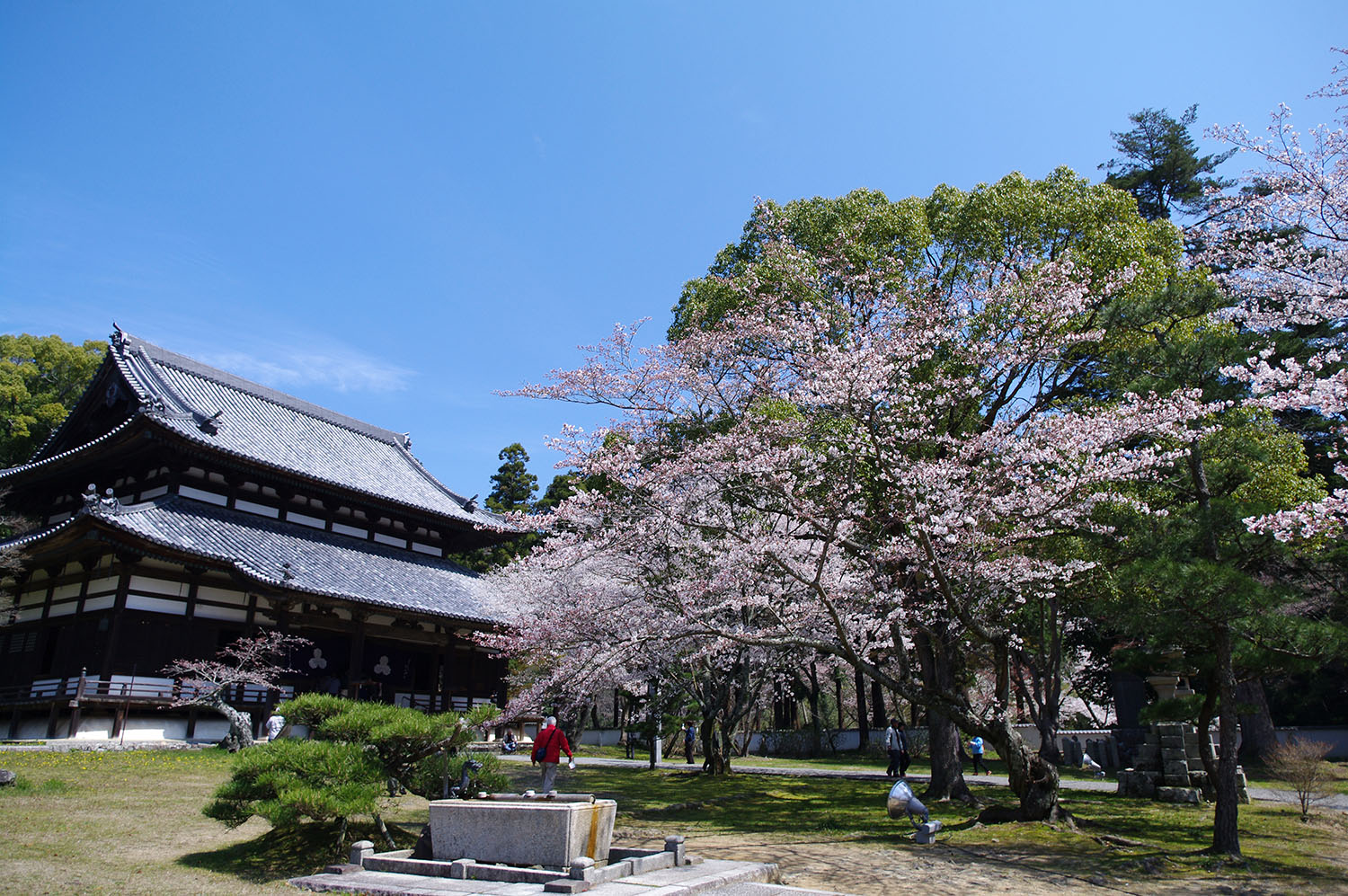 Negoroji and Sakura (Iwade, Wakayama, Japan)